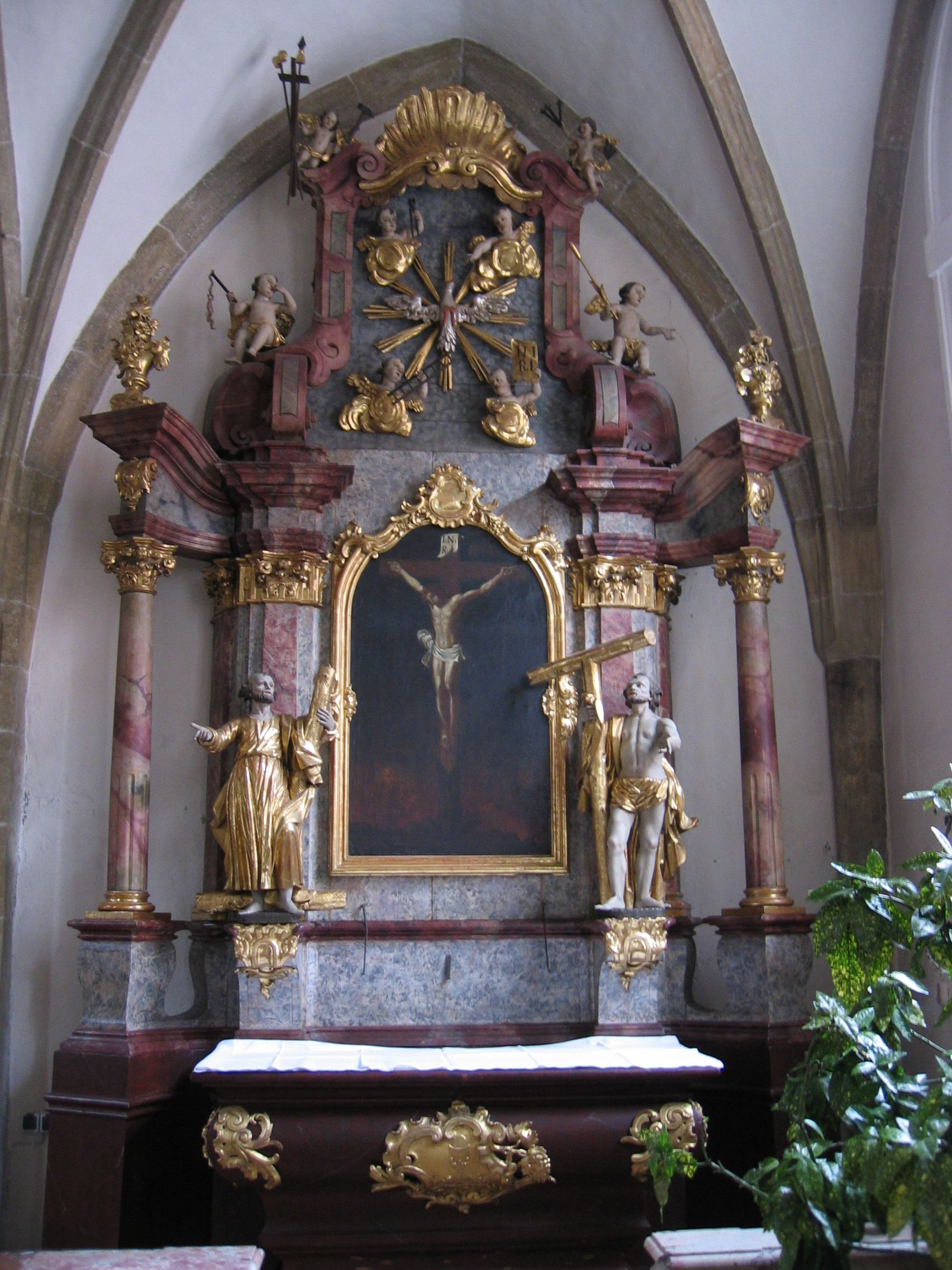 Kreuzaltar im Seitenschiff der Stadtpfarrkirche Freistadt